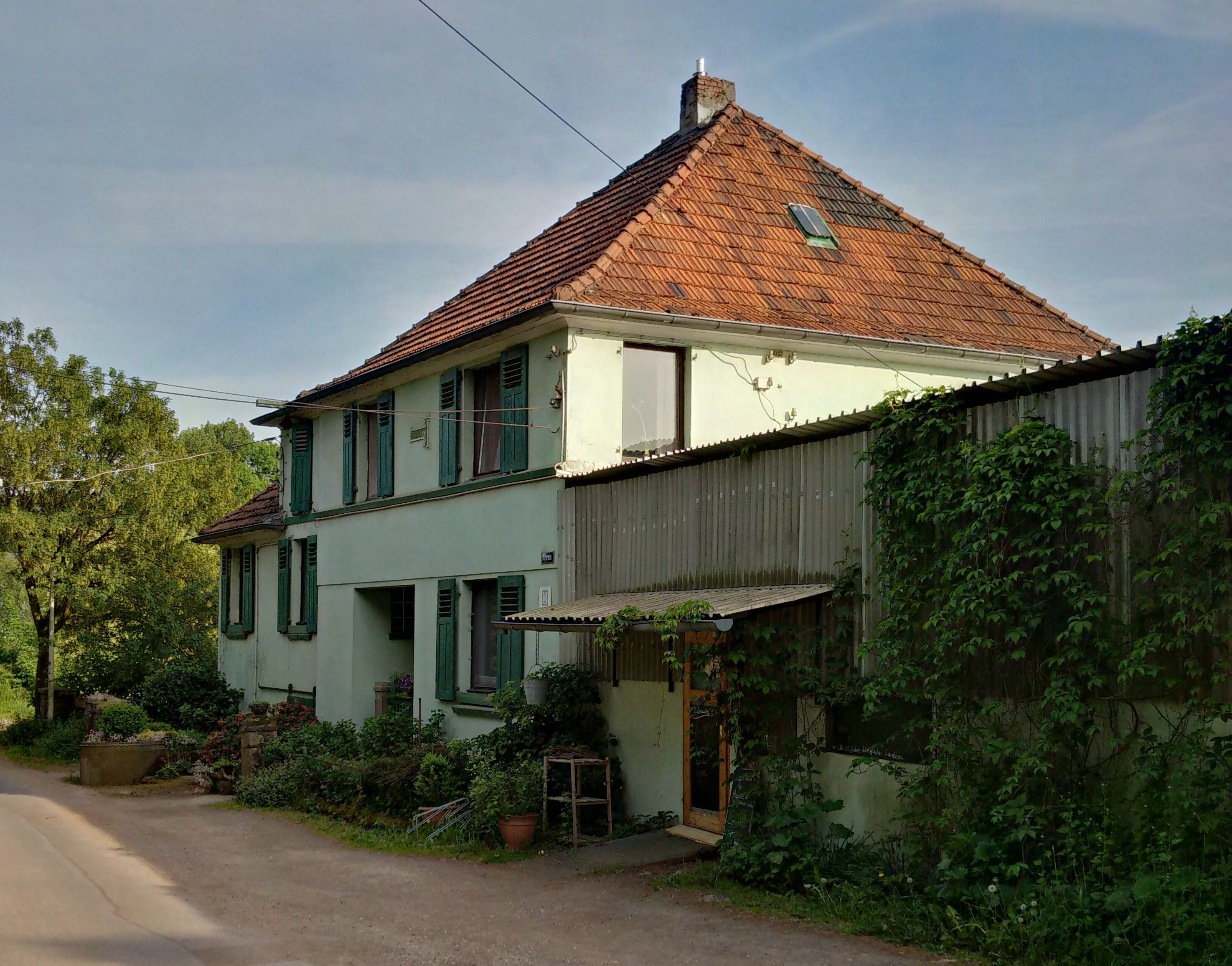 Gutshaus Ehren in Solingen, aufgenommen im Frühling 2016